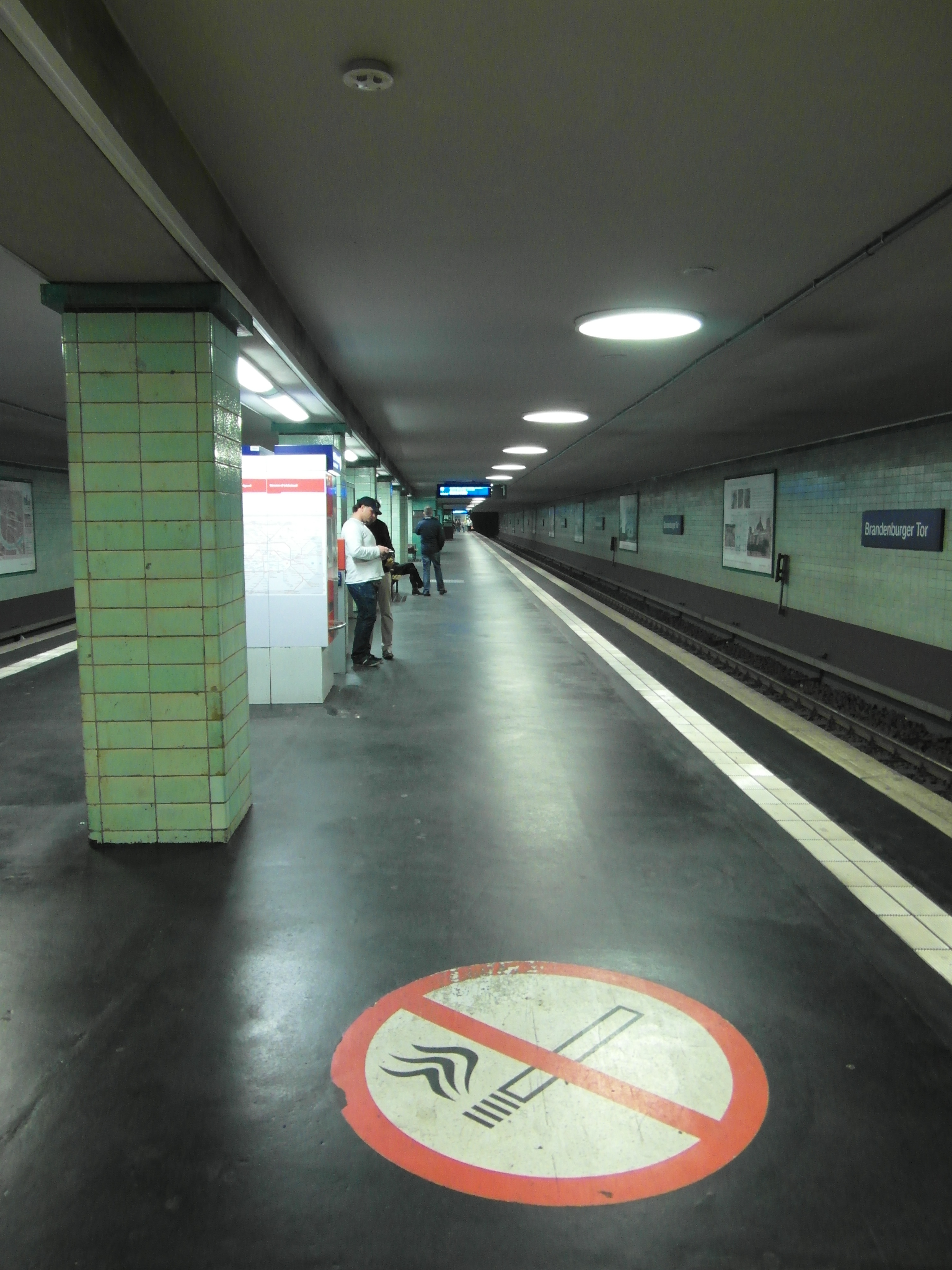 Ehemals S-Bahnhof Unter den Linden - Linien S1, S2, S25